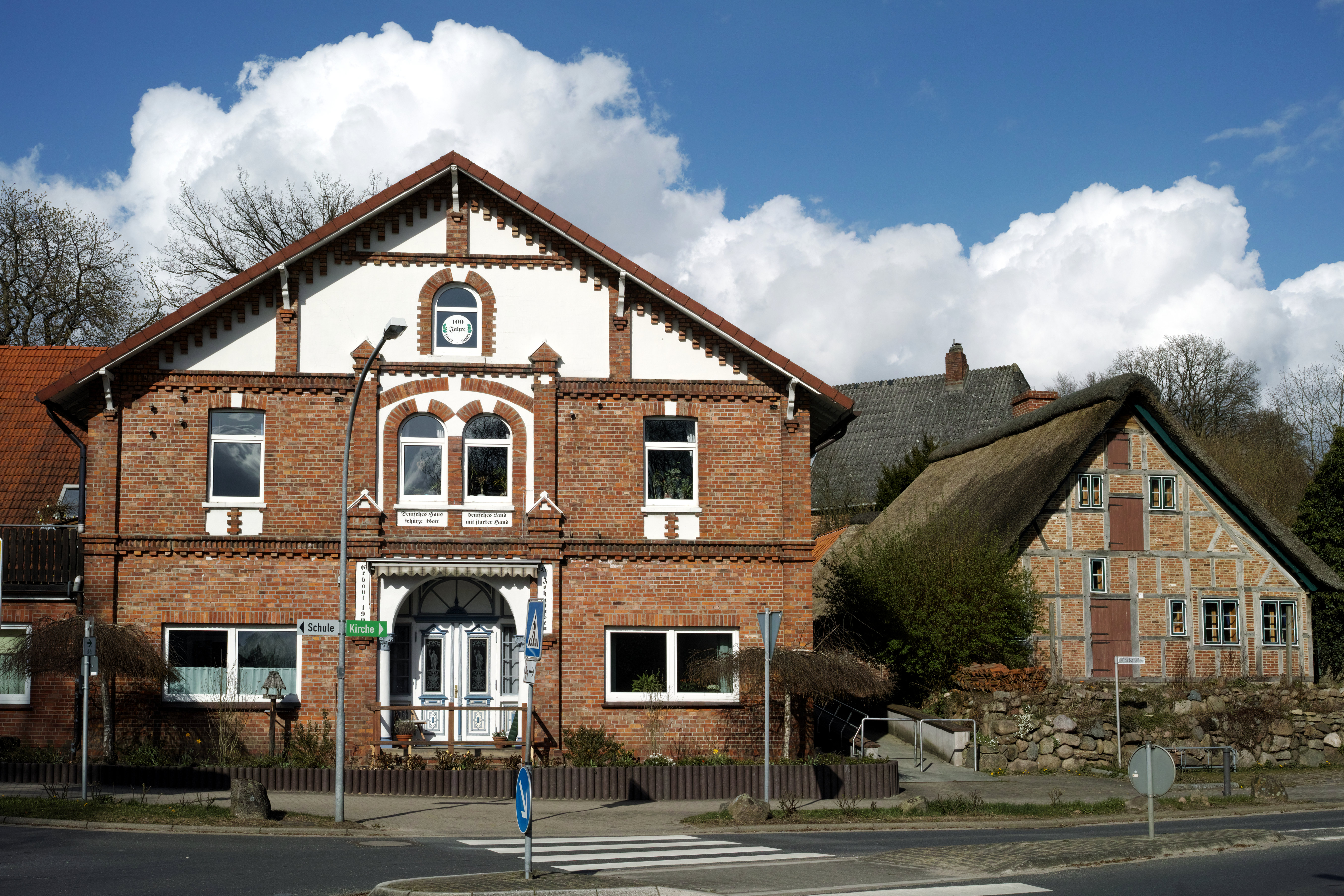 Moisburg: Hundertjähriges Gebäude an der Dorfstraße beim Kreisverkehr.